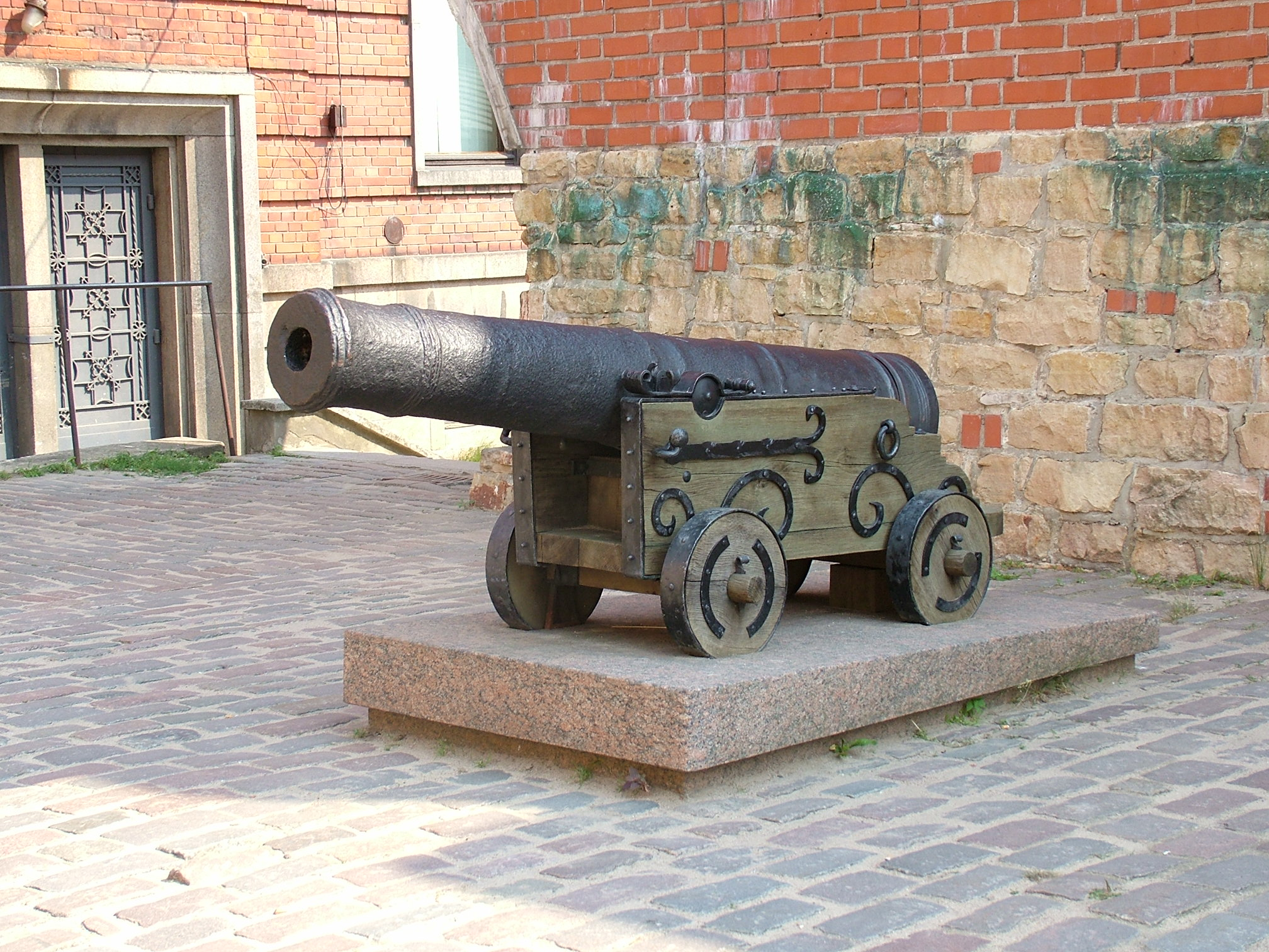 Cannon in Riga, Latvia.